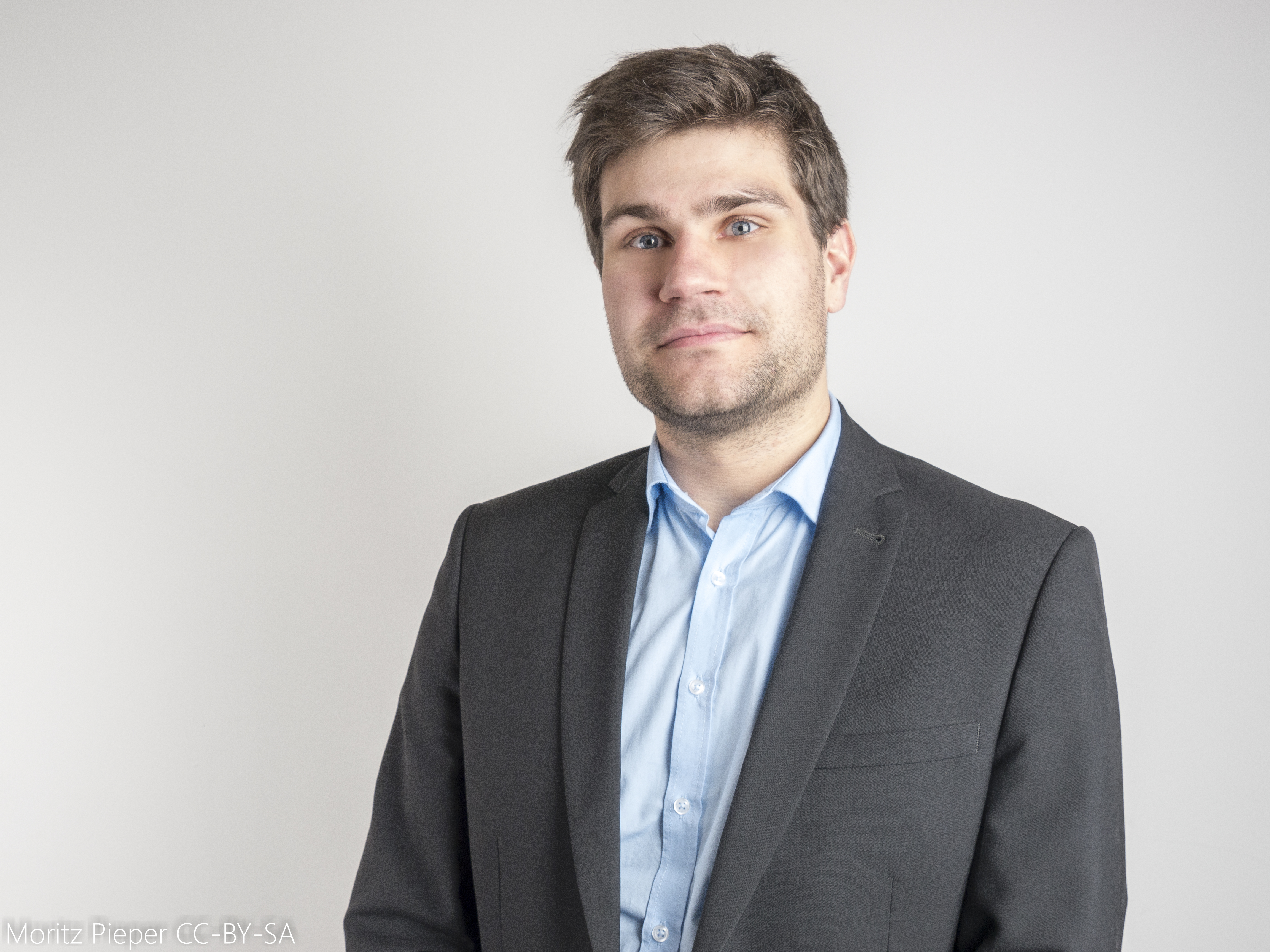 Ein Bild von Dennis Deutschkämer